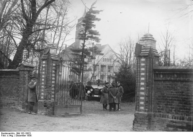 Breslauer Schutzpolizei verhaftet auf dem Schloss des Herrn von Oelffen in Jäschkowitz im Landkreis Breslau 200 Nationalsozialisten. Blick auf das Schloss des Herrn von Oelffen mit der Schutzpolizei nach der Verhaftung der 200 Nationalsozialisten.